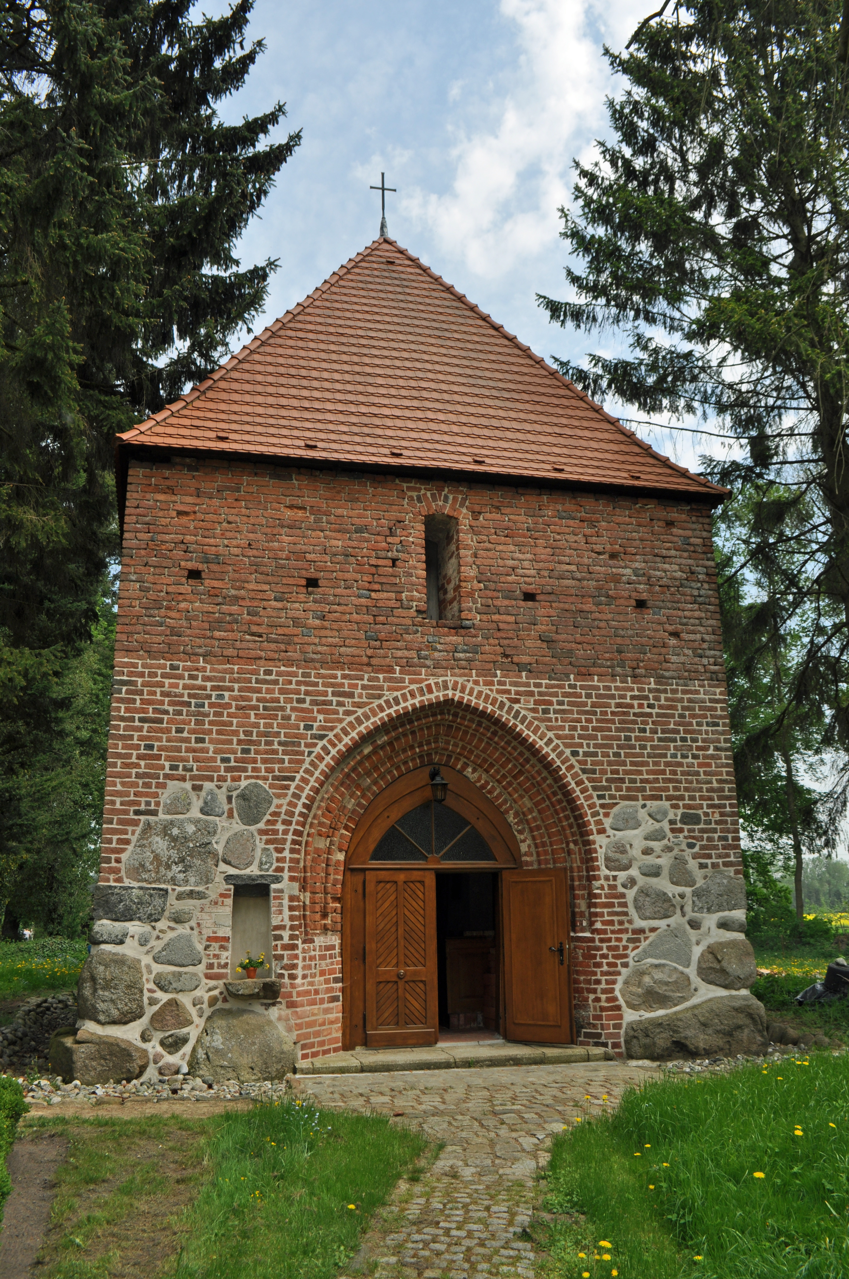 siehe Dateiname! Turm